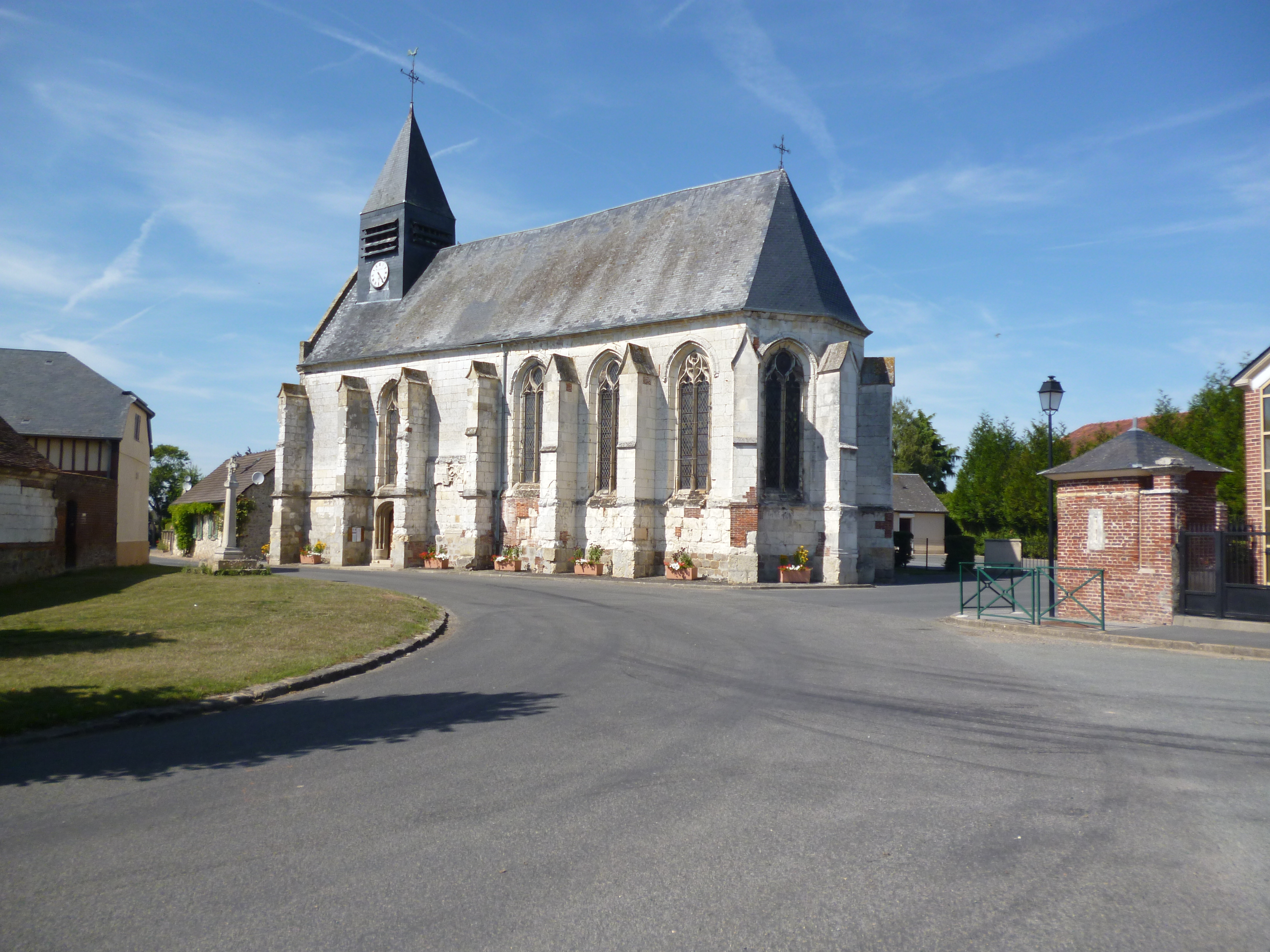 Eglise Notre-Dame-et-Saint-Samson de Quinquempoix (Oise).